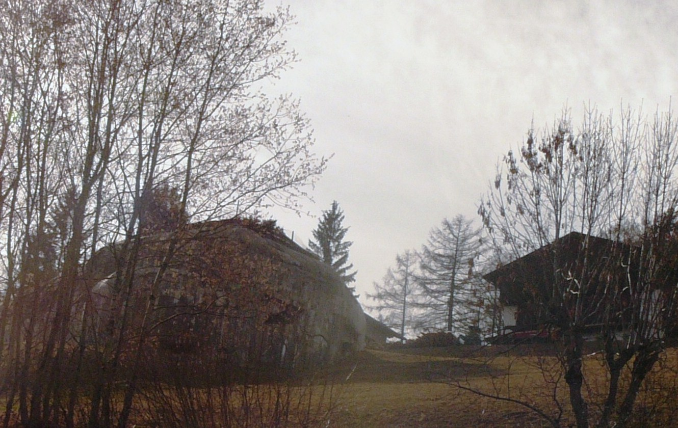 Opera 21, sciaves